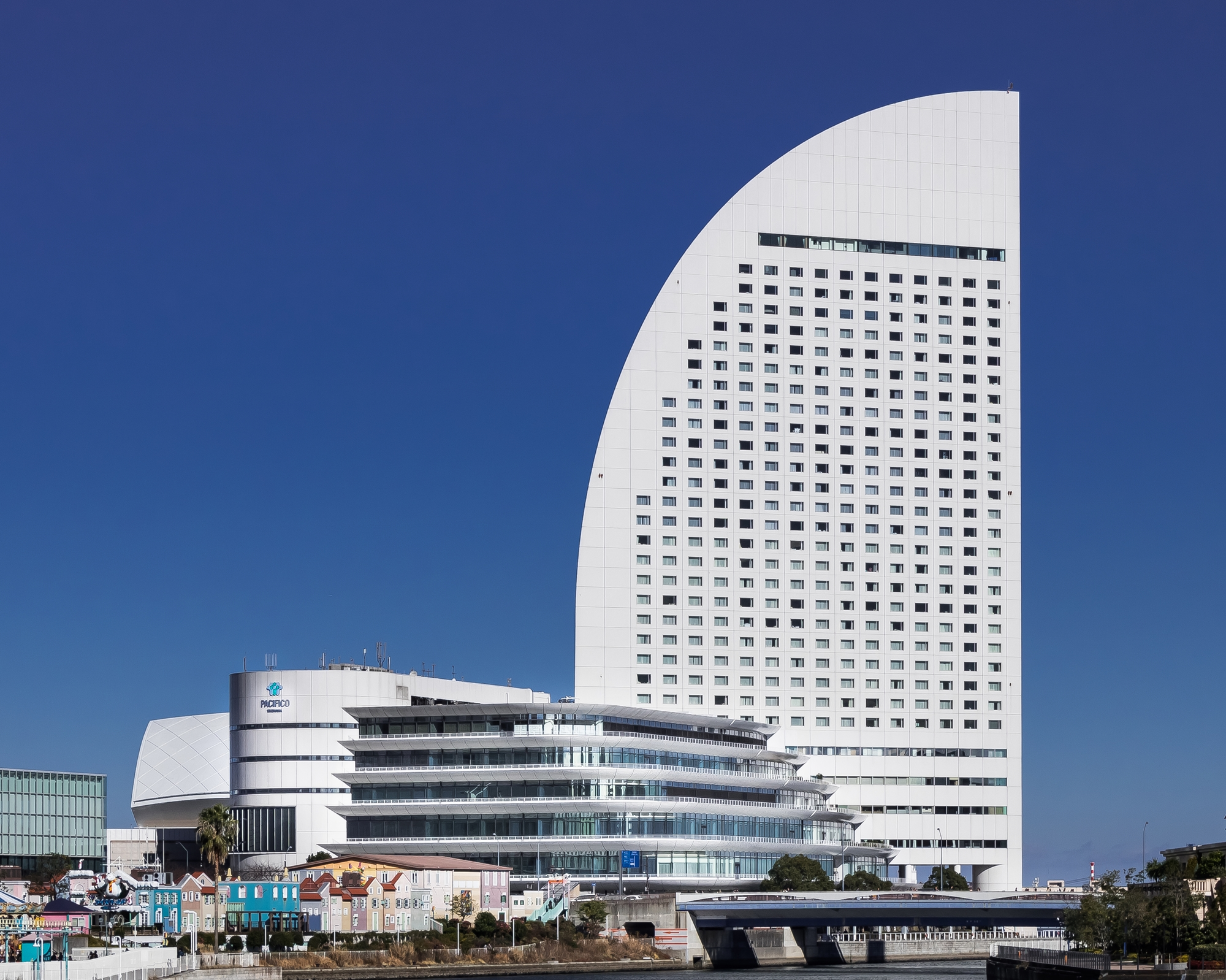 横浜国際平和会議場（ヨコハマグランドインターコンチネンタルホテルと会議センター）